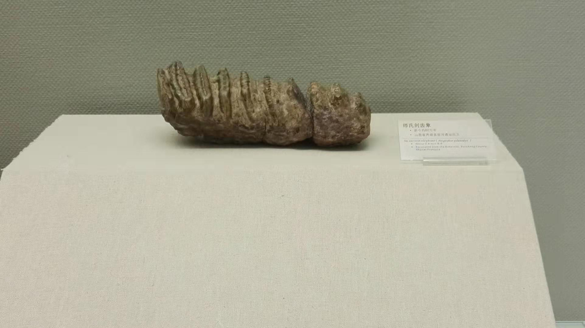 出土於山西省芮城匼河遺址的師氏劍齒象化石，距今約80萬年